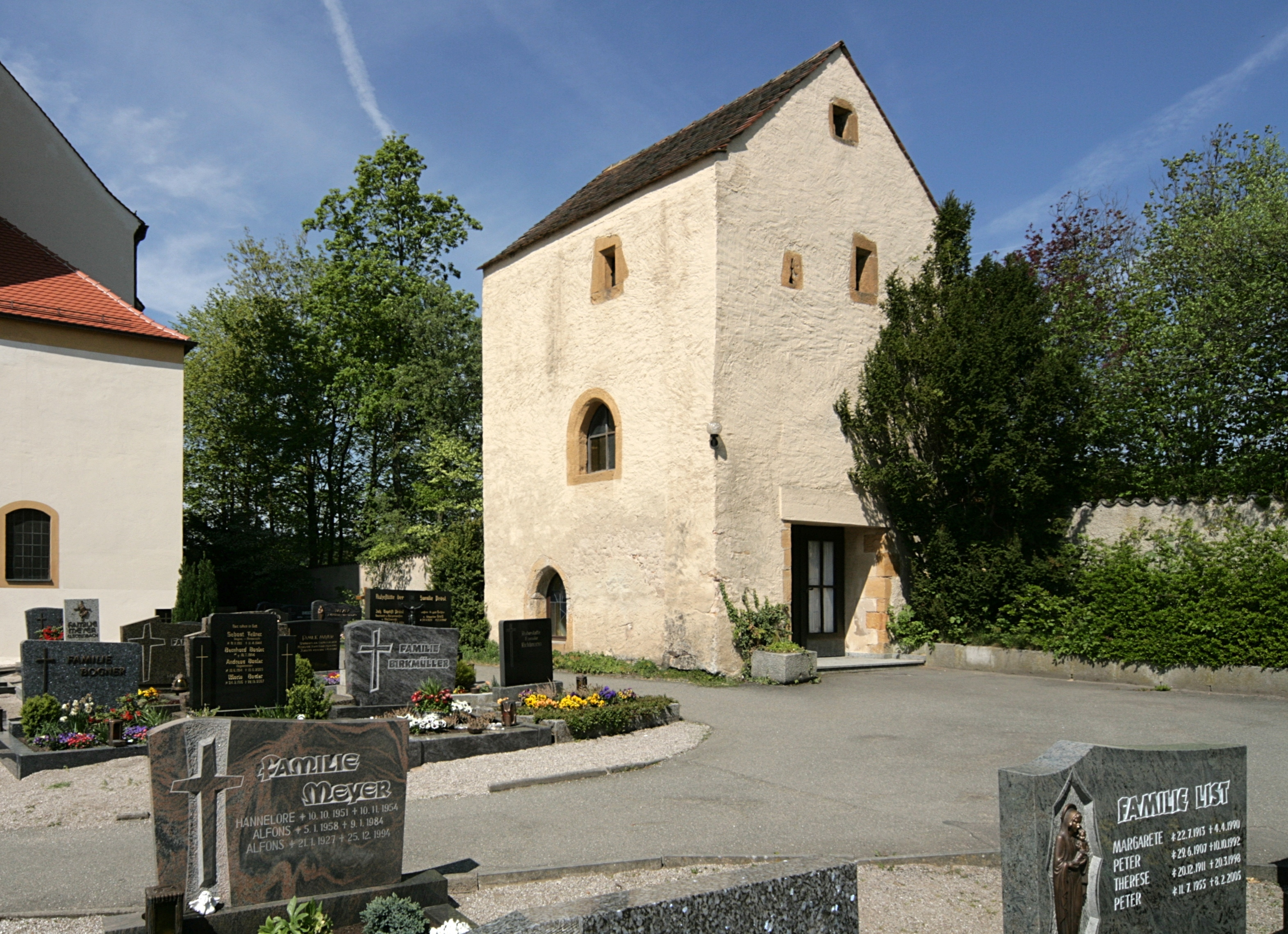 Leichenhaus im Friedhof von Hirschau-Ehenfeld, ehemaliger Wehrturm der Befestigung um die Kirche